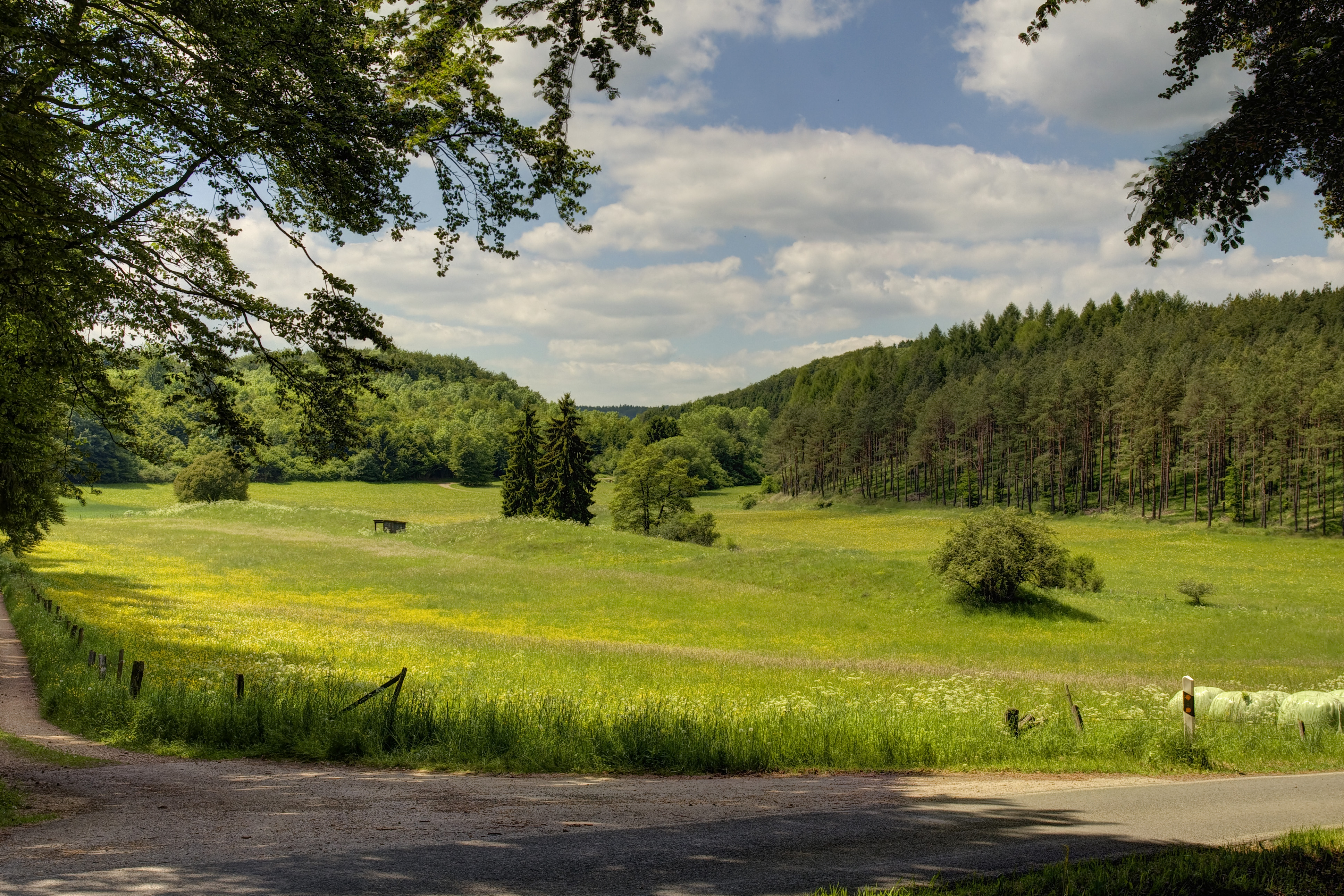 Im Wammesbachtal zwischen Alendorf und Wiesbaum, Naturschutzgebiet EU-002 „Lampertstal und Alendorfer Kalktriften mit Fuhrbach und Mackental“ im Kreis Euskirchen